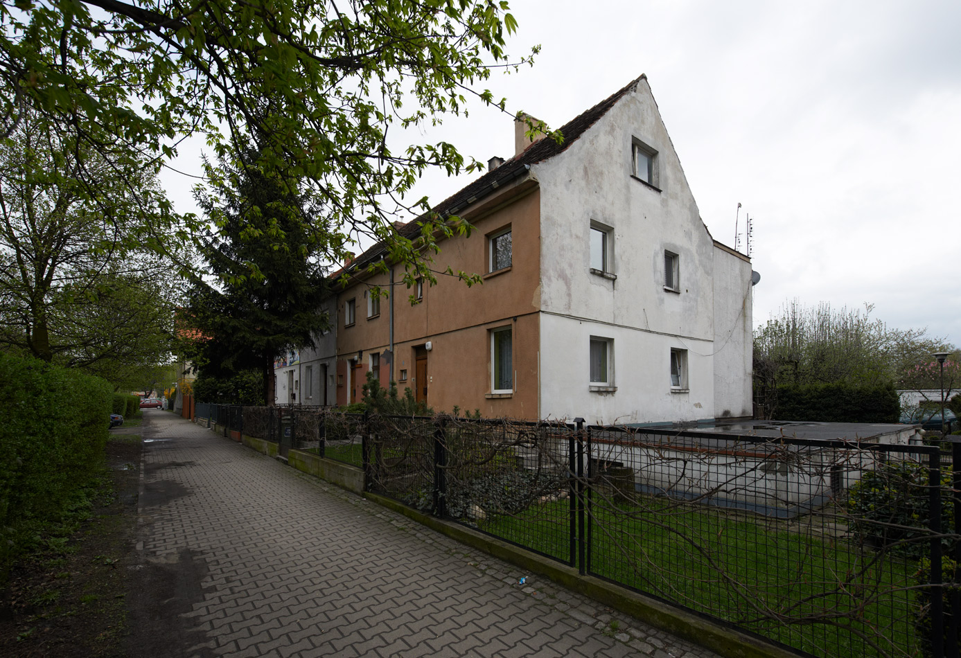 Wrocław: na pierwszym planie budynek przy Mickiewicza 79, za nim kolejne - do nru 85